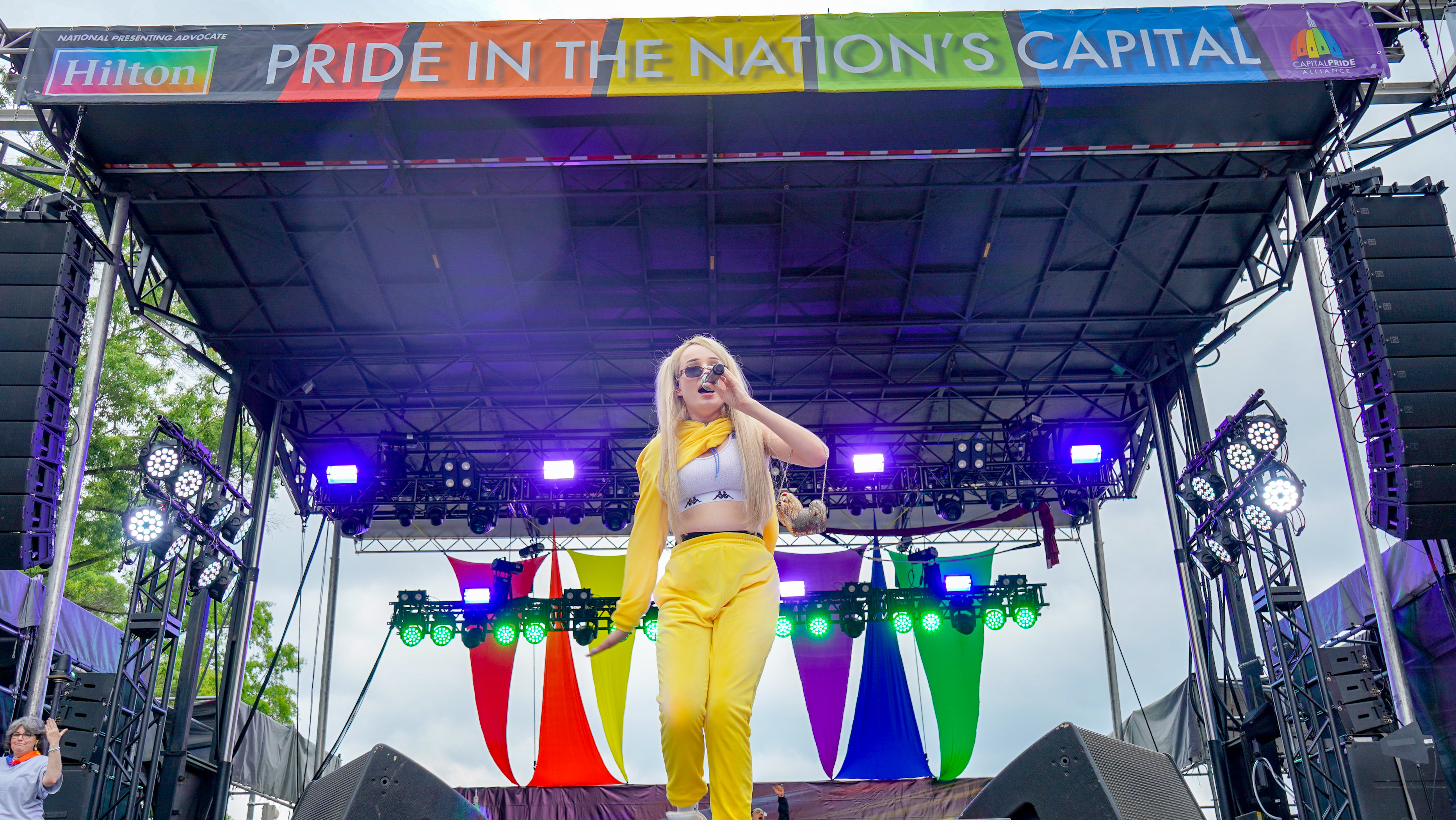 Kim Petras performs - Capital Pride concert 2018